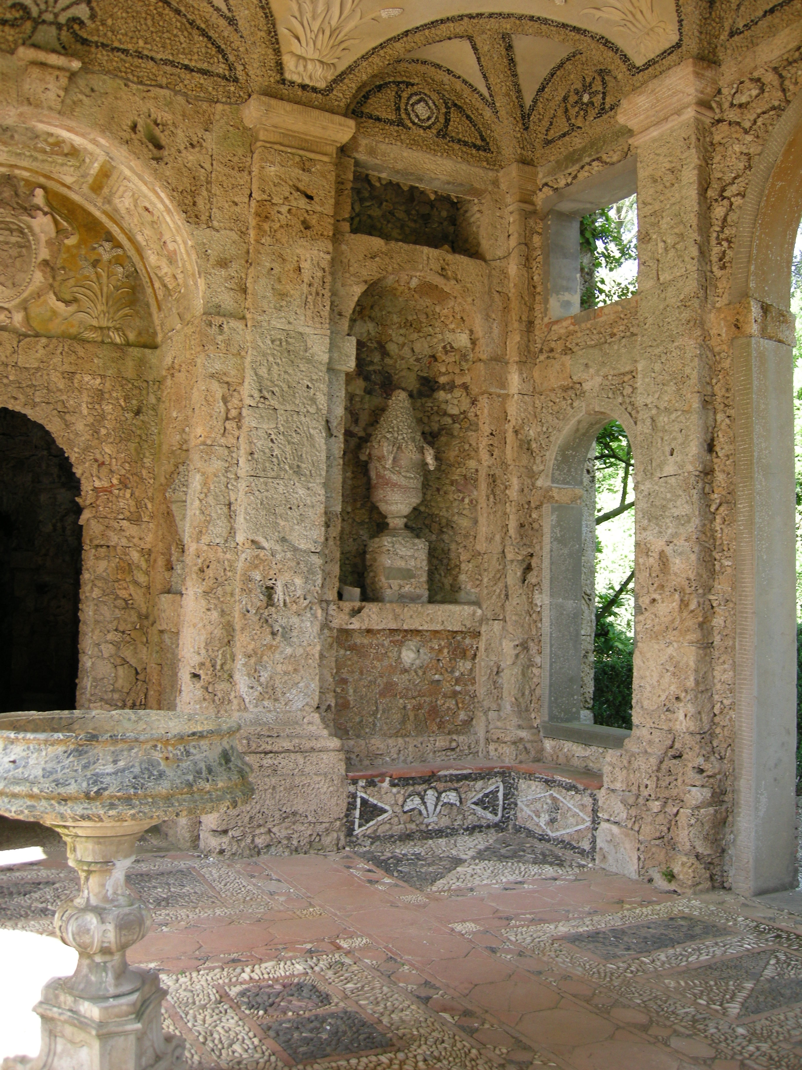 Villa reale di marlia, grotta del dio pan, interno, vano ingresso